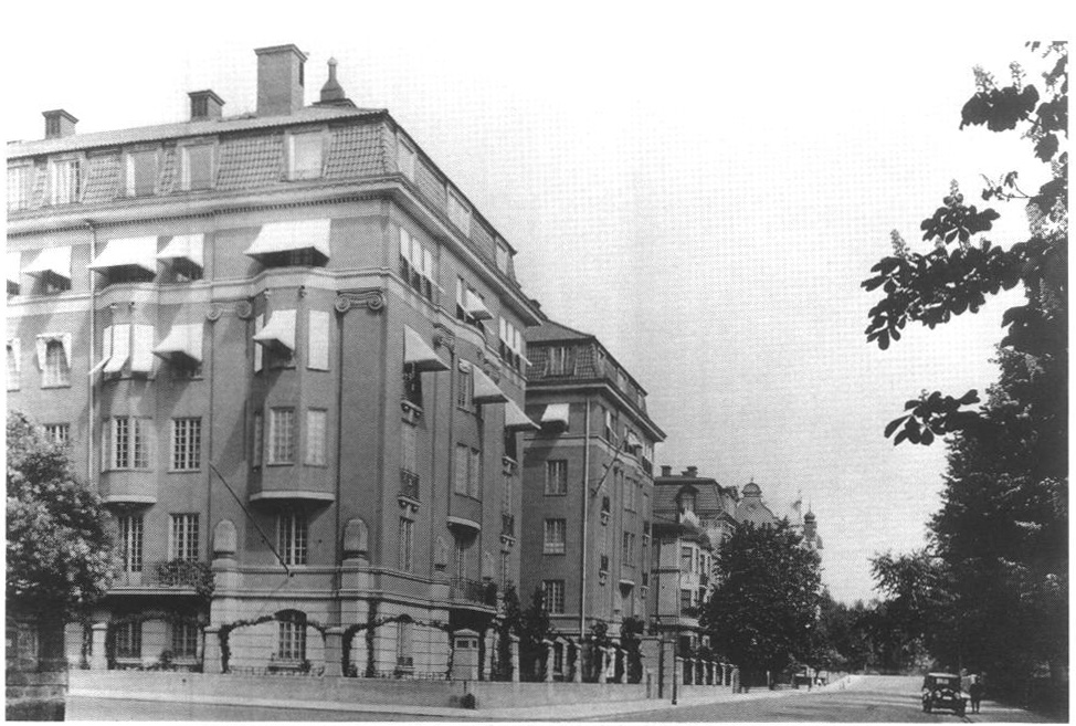 Fastigheten Villagatan 13, Stockholm, där Ivar Kreuger hade sin Stockholmslägenhet. Fastigheten ägdes av Ivar Kreugers fastighetsbolag Hufvudstaden fastighetsbolag AB. Foto från omkring 1928-30.